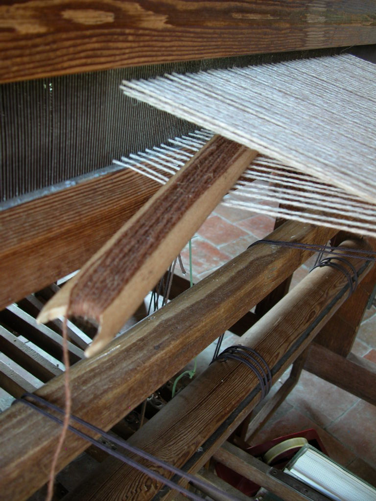 foto mia personale, navetta mette il filo di trama nel passo, 2007 Licensing Categoria:Immagini sulla tessitura